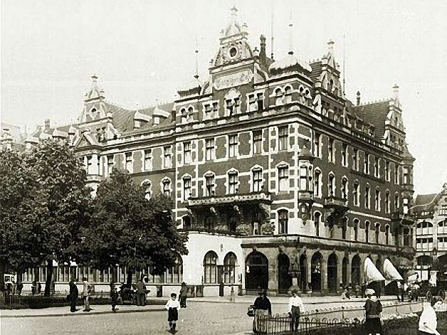 Hotel Danziger Hof in Danzig, Dominikswall 6 (Wały Jagiellońskie 2/4), mit einem nach 1908 angefügten Vorbau im Erdgeschoss am Dominikswall (links)